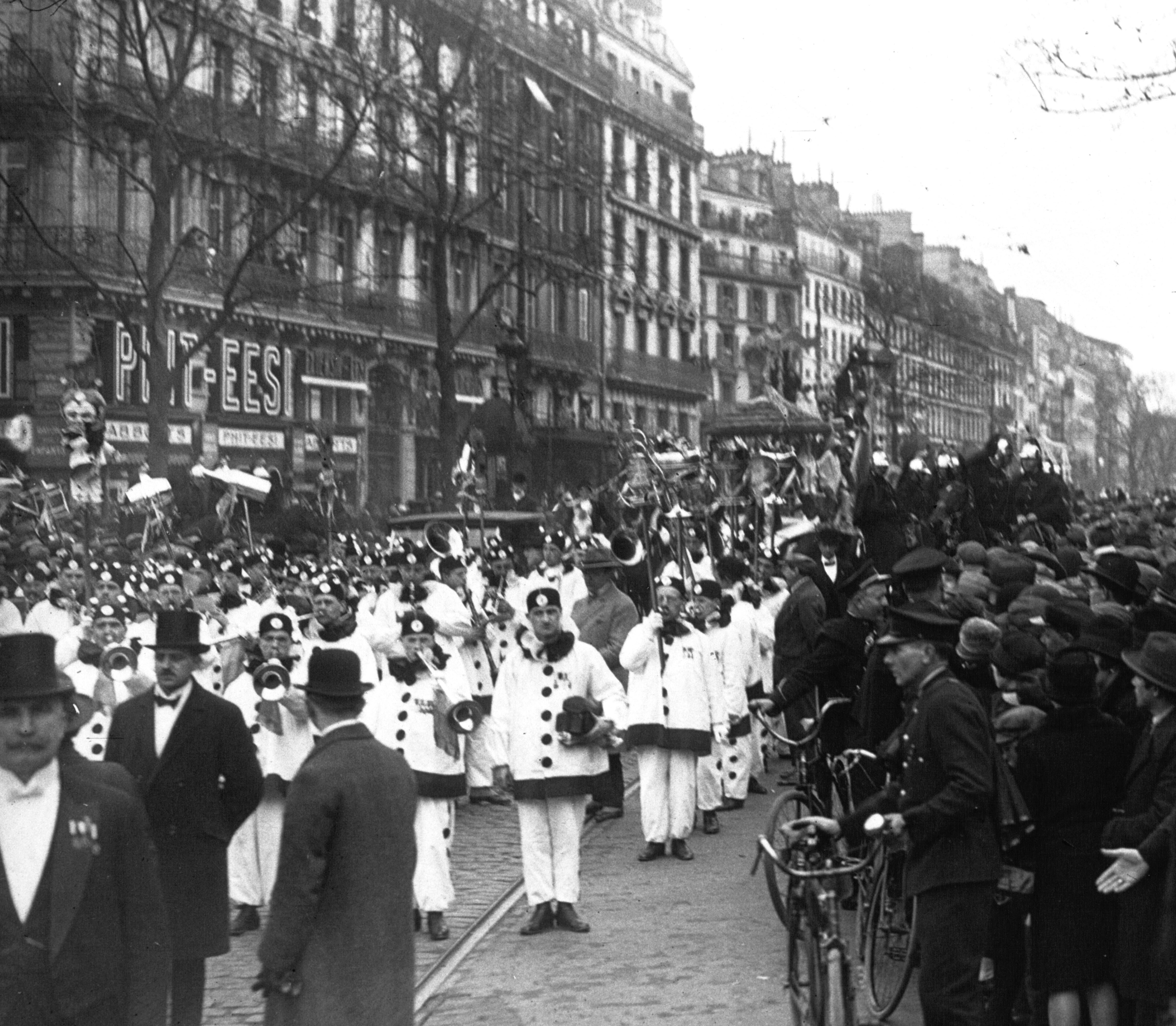 L'ensemble de bigophones du Soutien de Saint Gilles défile à la Mi-Carême 1927 à Paris.